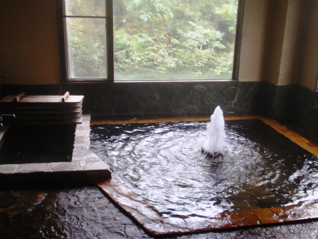 新潟県駒の湯山荘浴室